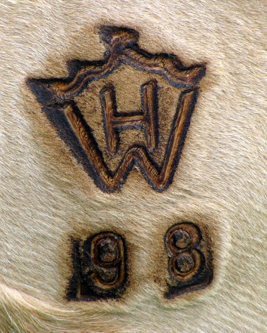 Haflinger-Brandzeichen